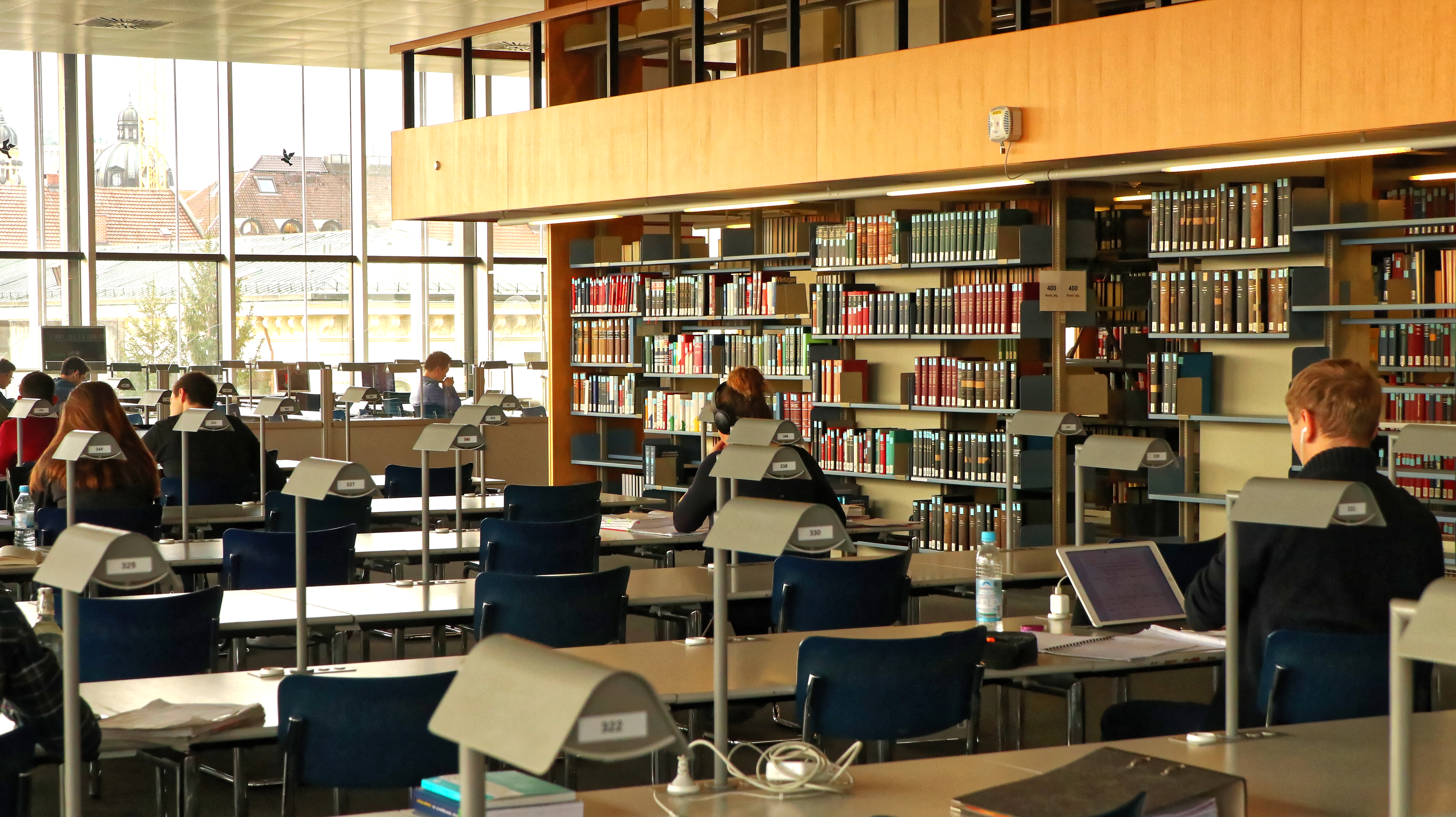 Hauptlesesaal in der BSB